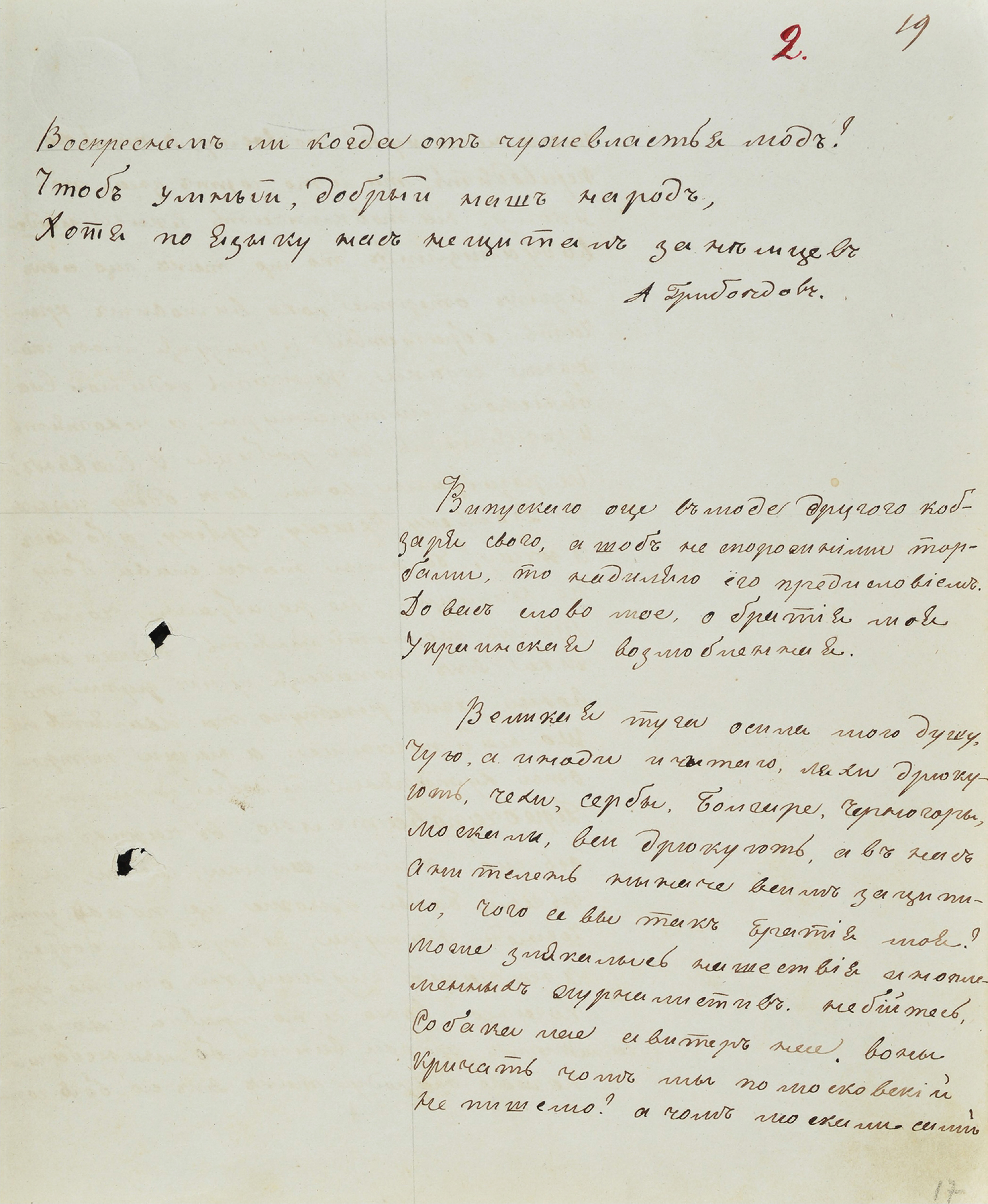 Тарас Шевченко. Передмова до «Другого Кобзаря». Перша сторінка. Седнів. 1847.03.08